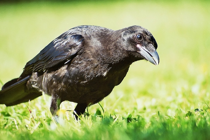 Corvus corone